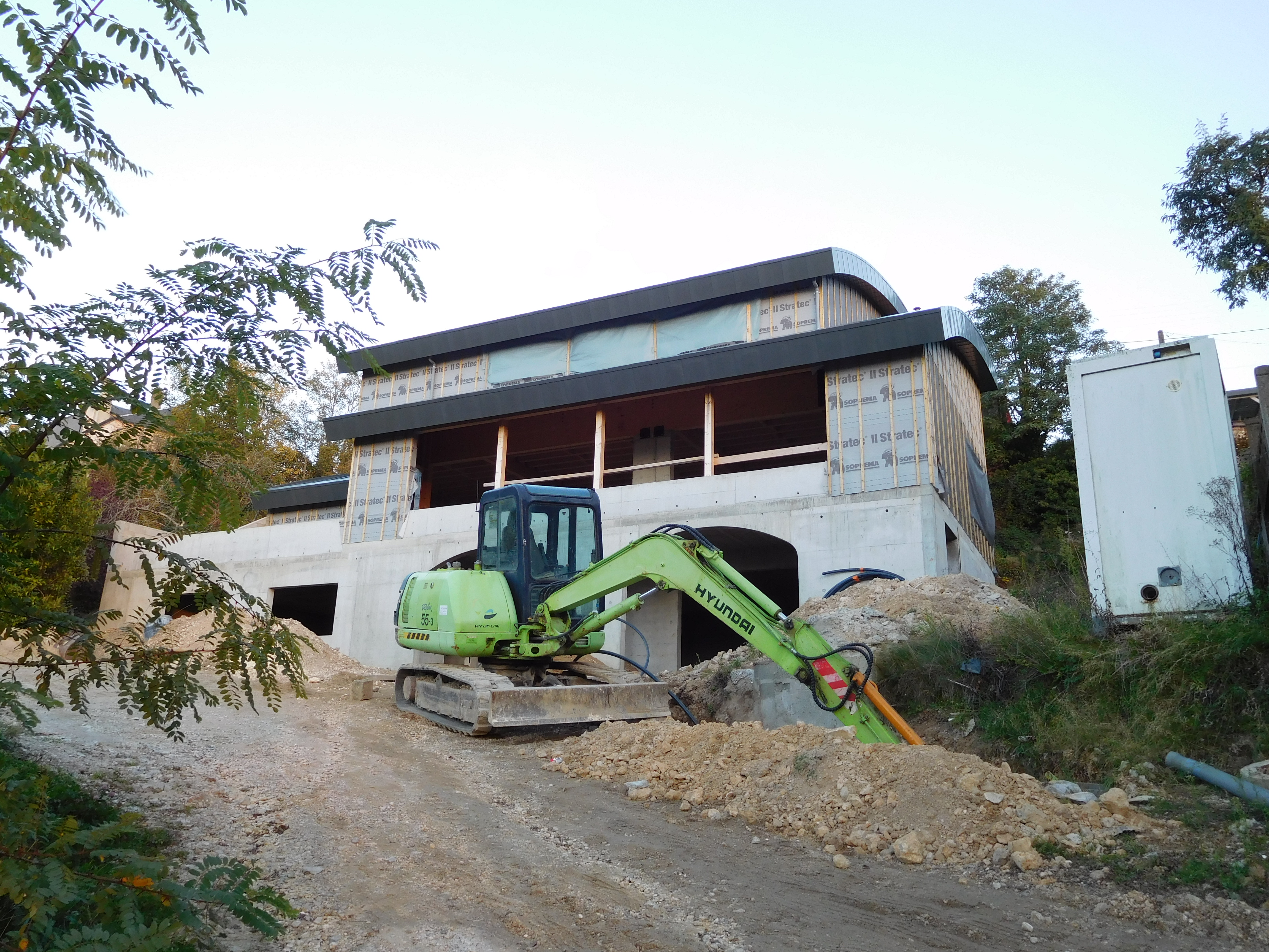 Minipelle Hyundai Robex 55-3 sur un chantier en France.